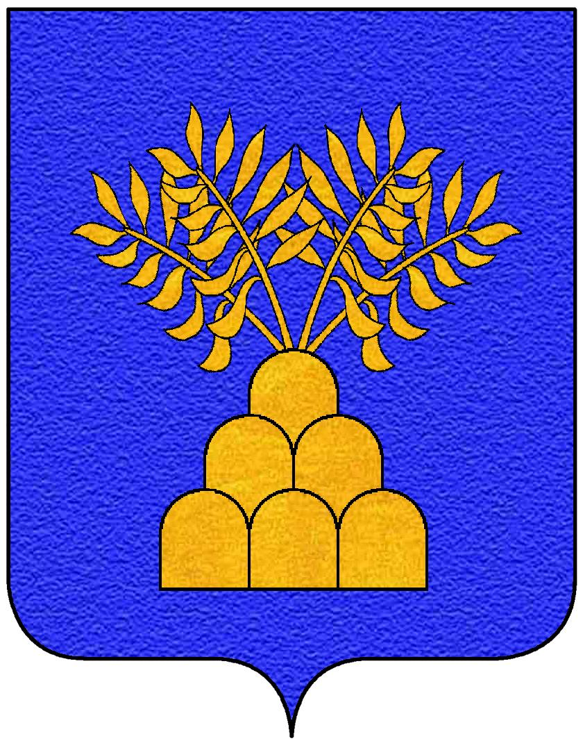 Stemma della famiglia Lorini